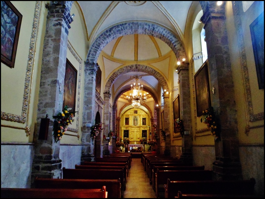 Parroquia Cristo Rey y Santa María de Guadalupe,Tulpetlac,Ecatepec,Estado de México.